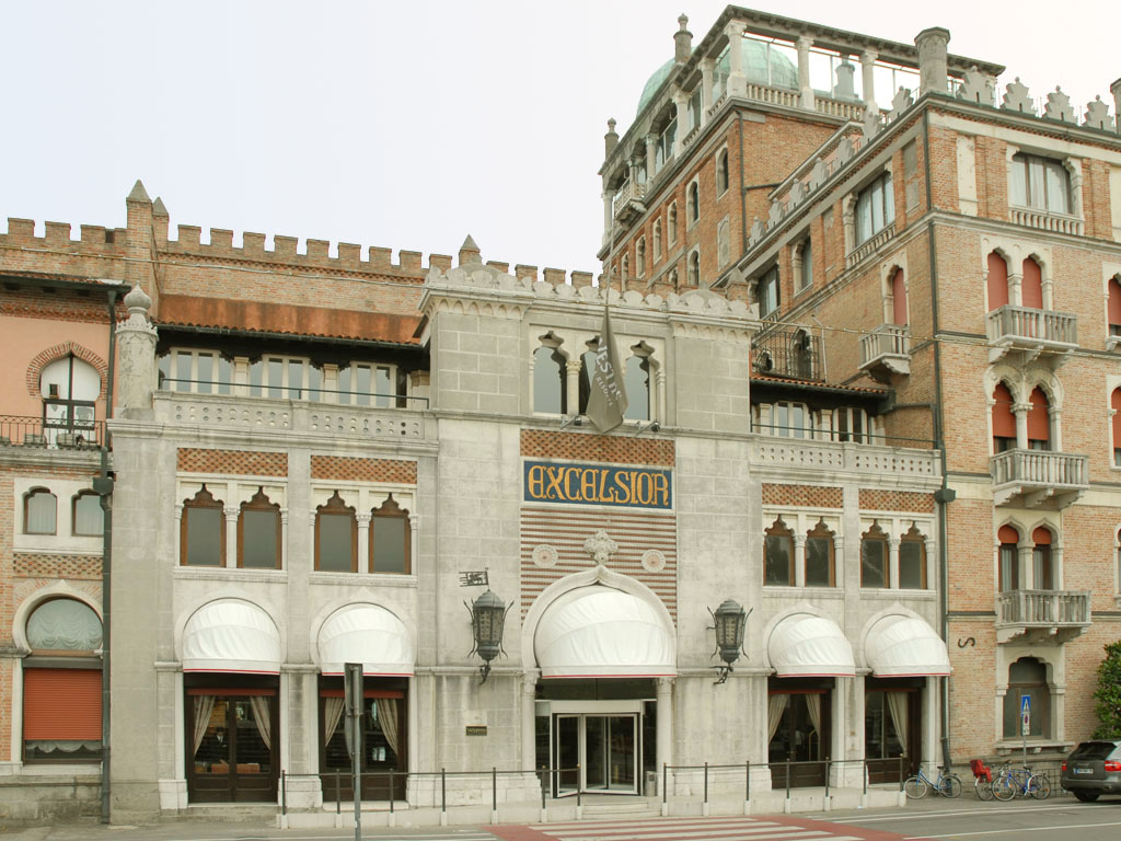 De style néo-mauresque, le grand hôtel Excelsior a ouvert ses portes en 1908.